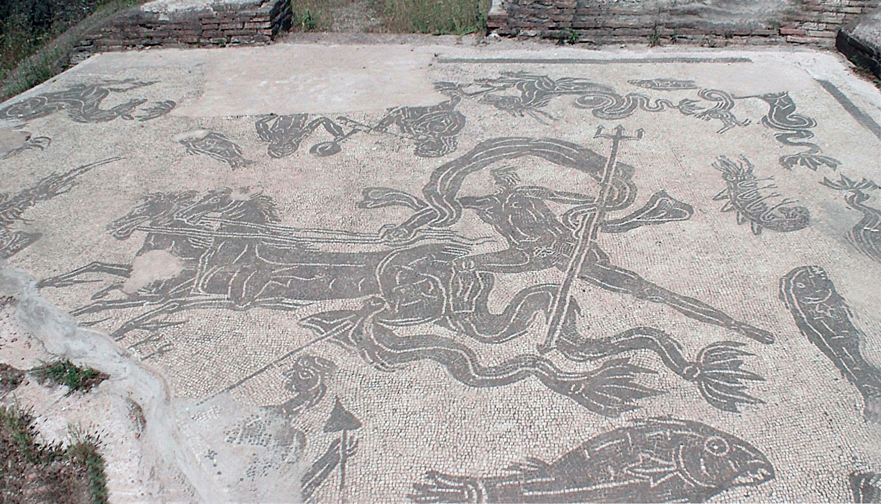 MOSAICO VILLA DI PLINIO